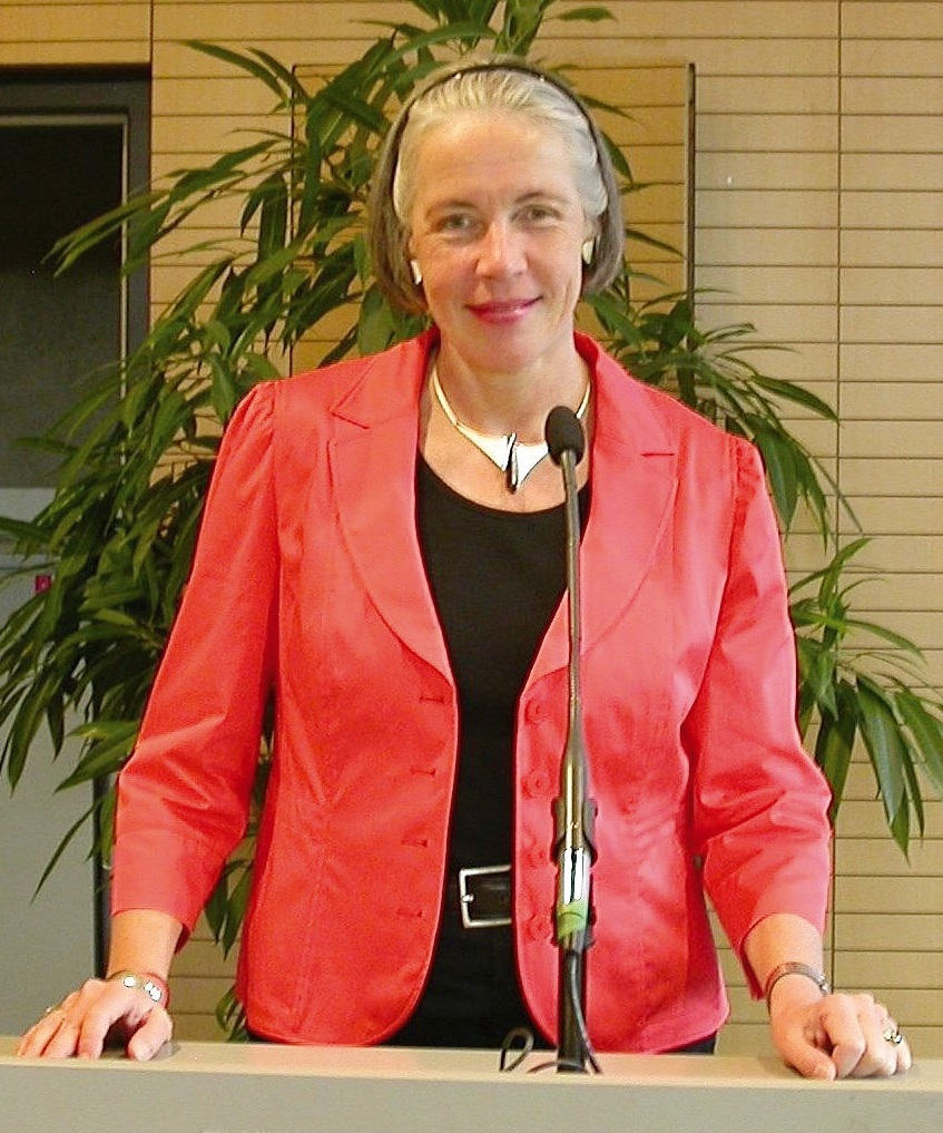 Univ. Prof. Barbara Neymeyr im Stiftungssaal der Alpen-Adria-Universität Klagenfurt